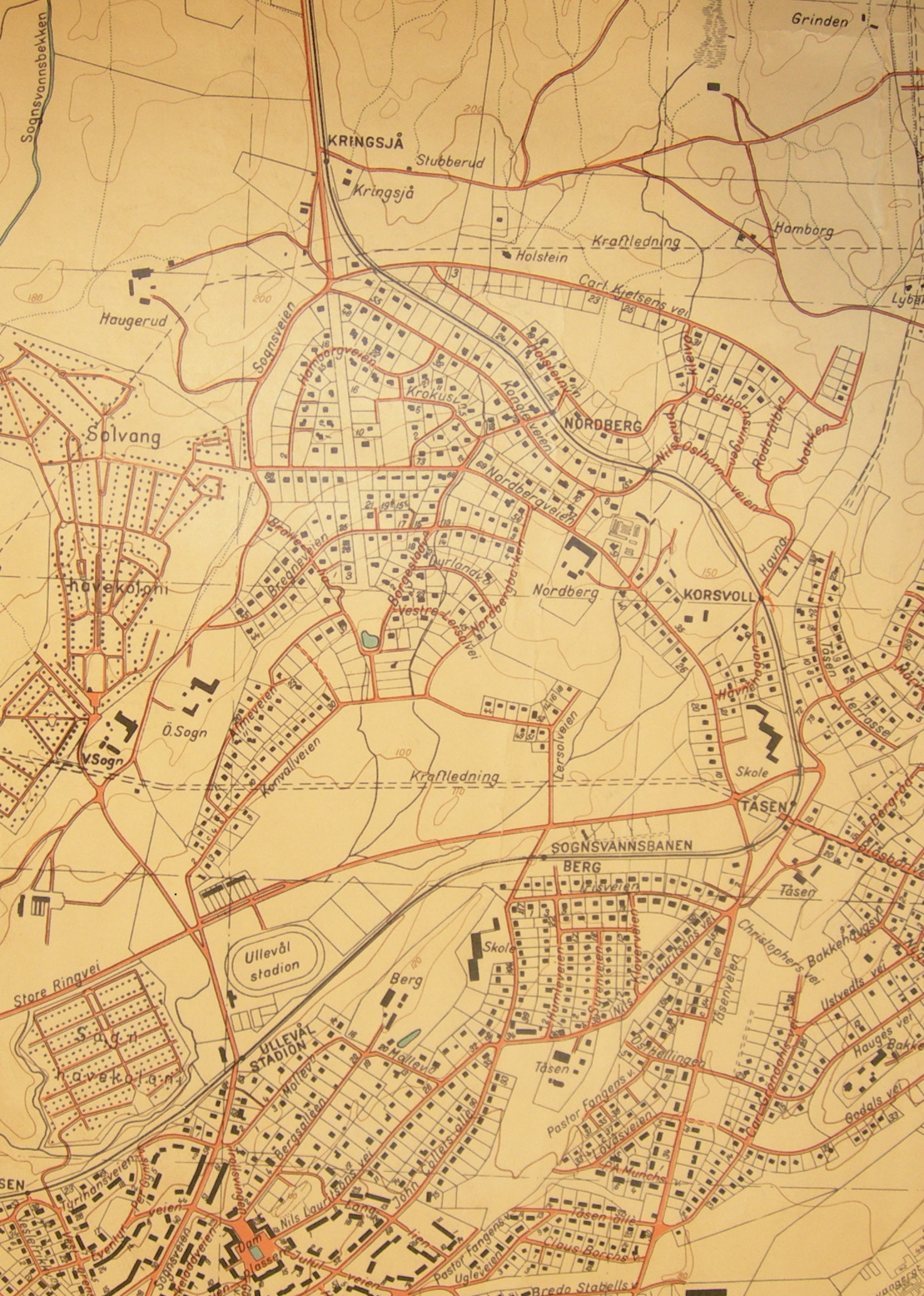 Utsnitt av "Kart over Aker søndre del", 1:10000